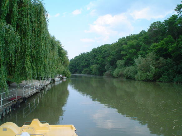 Kamchiya, Bulgaria.